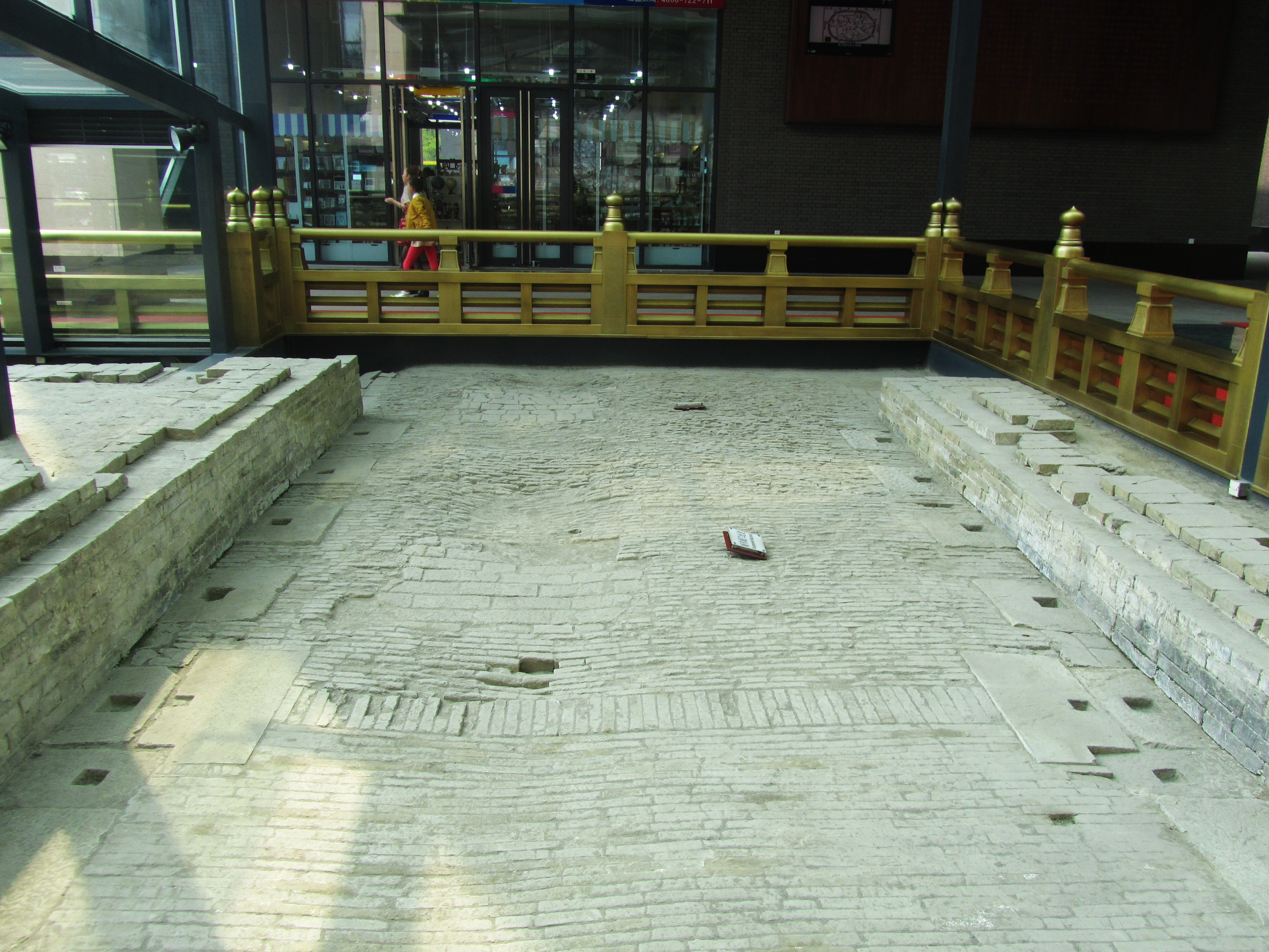 湖州子城城墙遗迹，南宋府东门城门过道，自城外向城内看（自东向西）。